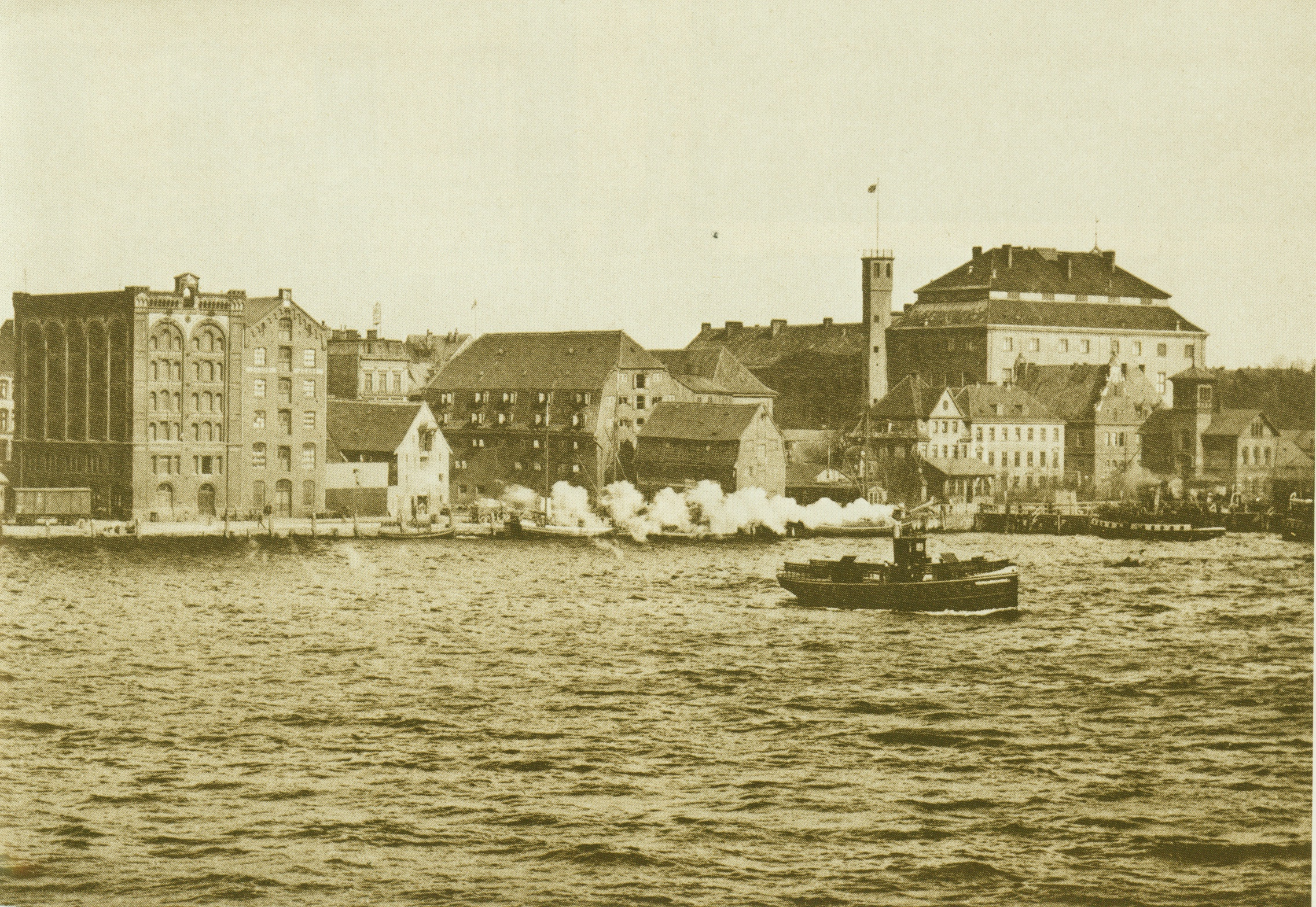 Kiel: Speicher am Dampfschiffskai (Sartorikai) (1893); rechs das Kieler Schloss